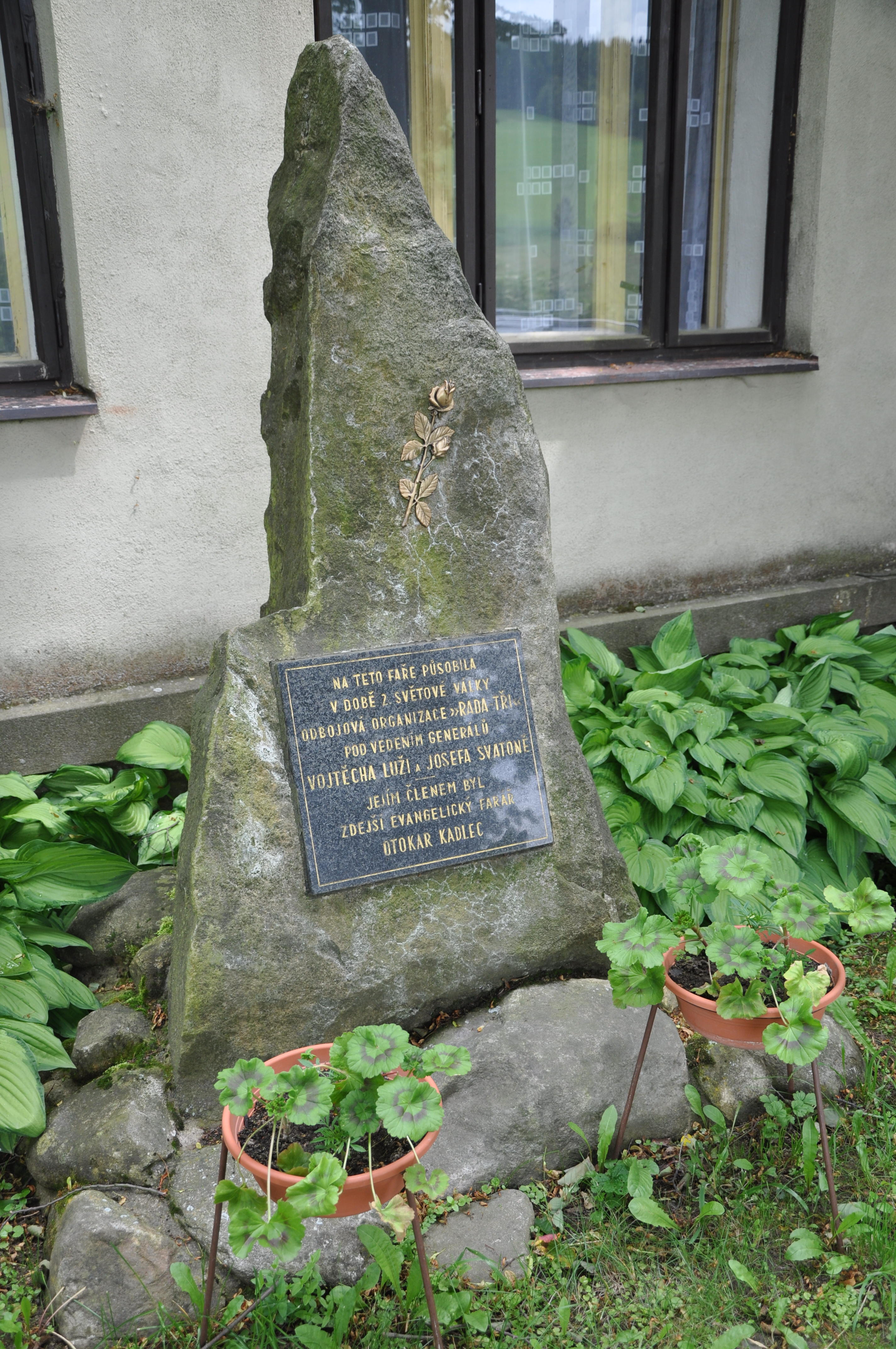 Pamětní deska Rady tří před evangelickou farou v Telecím, okres Svitavy. NA TÉTO FAŘE PŮSOBILA V DOBĚ 2. SVĚTOVÉ VÁLKY ODBOJOVÁ ORGANIZACE RADA TŘÍ POD VEDENÍM GENERÁLŮ VOJTĚCHA LUŽI A JOSEFA SVATONĚ. JEJÍM ČLENEM BYL ZDEJŠÍ EVANGELICKÝ FARÁŘ OTOKAR KADLEC